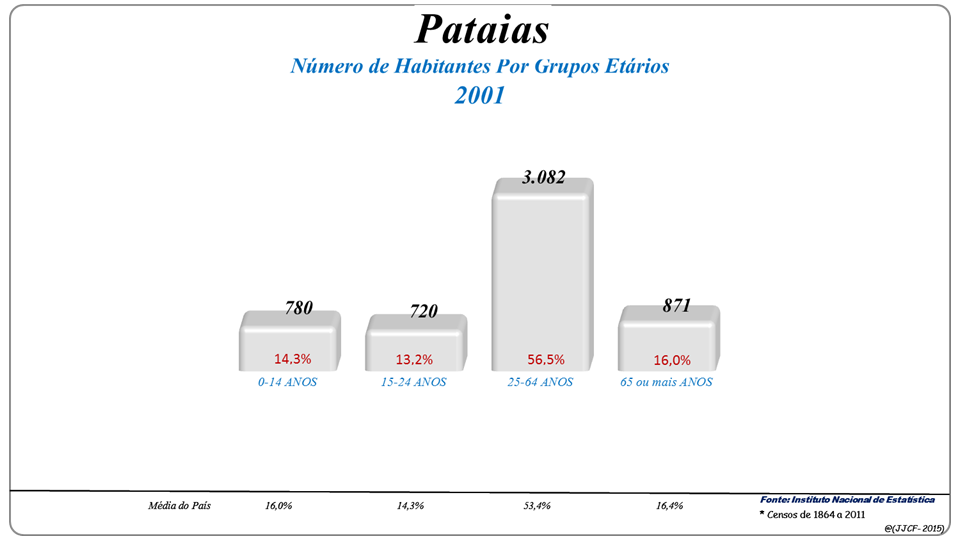 População